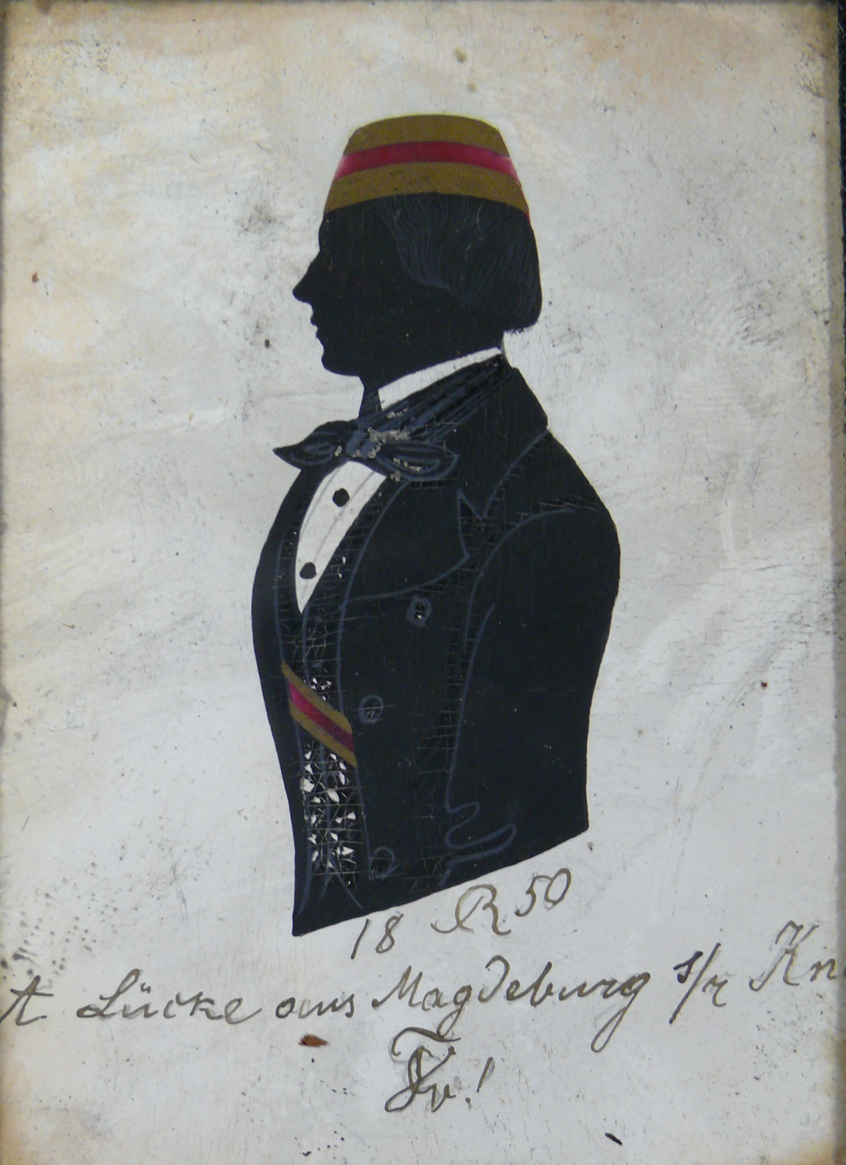 Silhouette des späteren Chirurgen Albert Georg Lücke (1829-1894) als Aktiver des Corps Vandalia Heidelberg